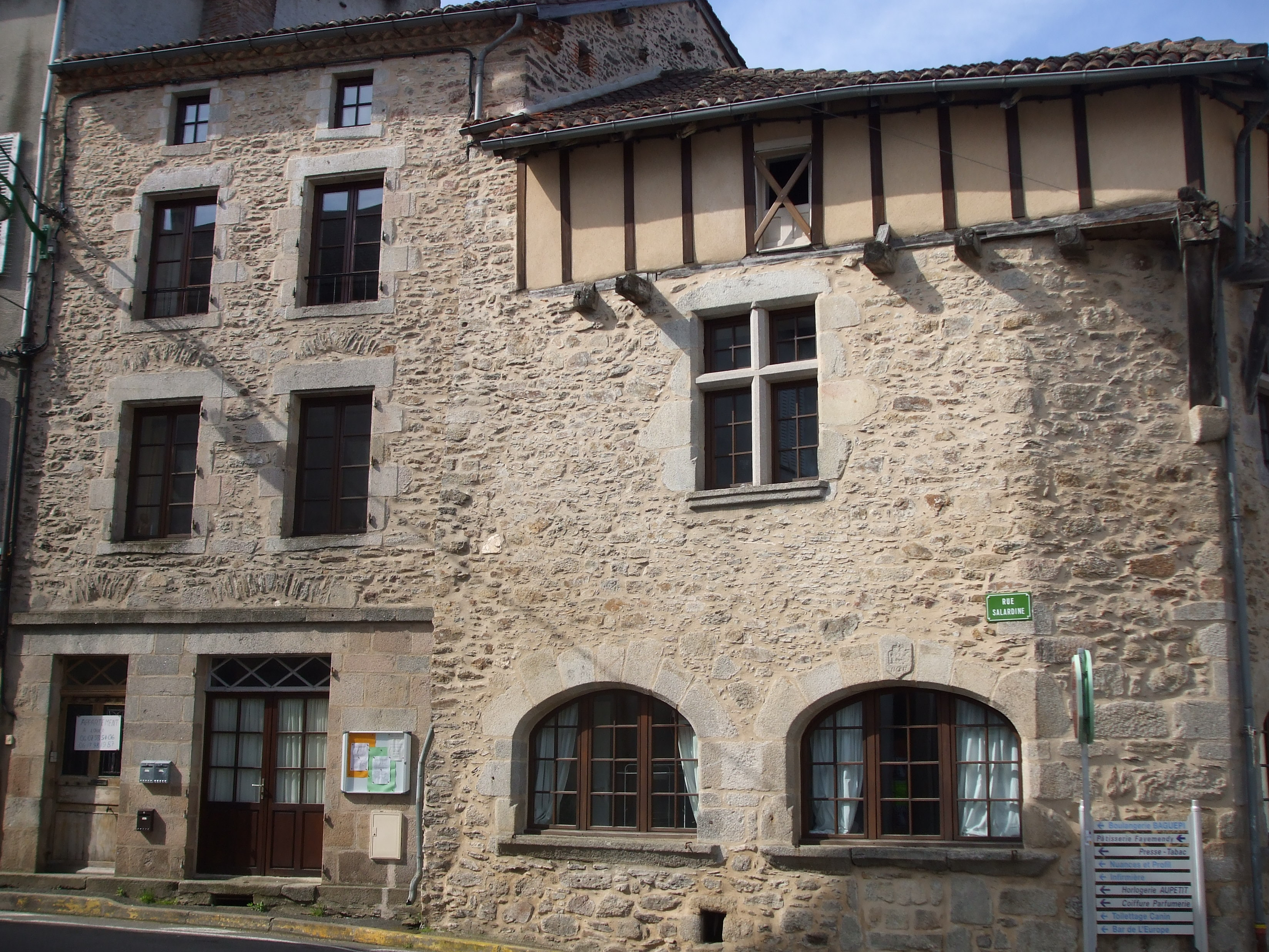 Châlus, Haute-Vienne, France, maison médiévale